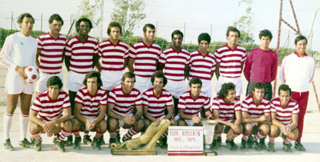 Équipe du Club africain lors du doublé de 1972-1973 Debout de gauche à droite : Attouga, Khedher, Retima, Gouchi, Mrad, Zitouni, Toujani, Khablachi, Naili, Bouabsa Accroupis de gauche à droite : Belghith, Khouini, Chaibi, Hassen, Chicha, Nasri, Zidi, Rahmouni